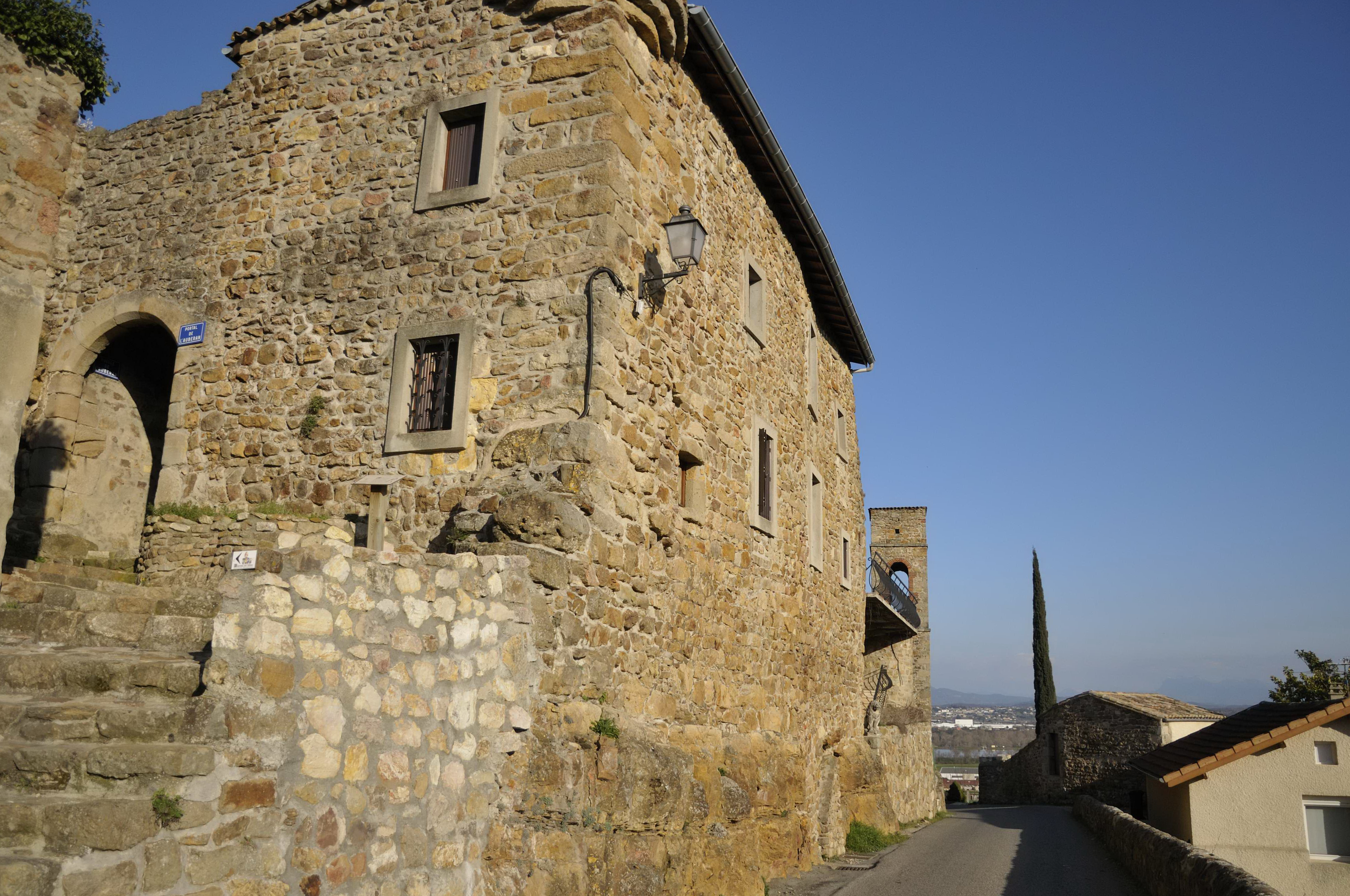 porte de l'Auberan